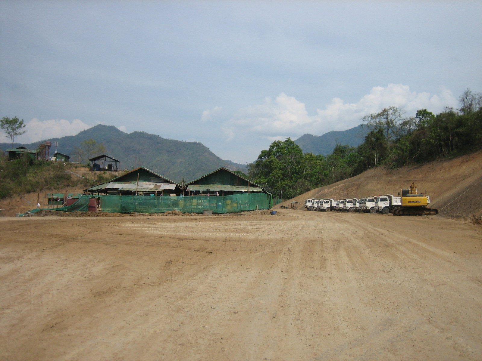 Xayaburi Mainstream Mekong Dam